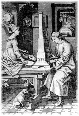 Positief dat bespeeld wordt en een calacante die twee handblaasbalgen bedient. Oude gravure; publiek domein.